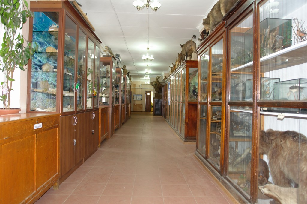 Этаж Кафедры зоологии и экологии, Биолого-химический факультет МПГУ, 2009.